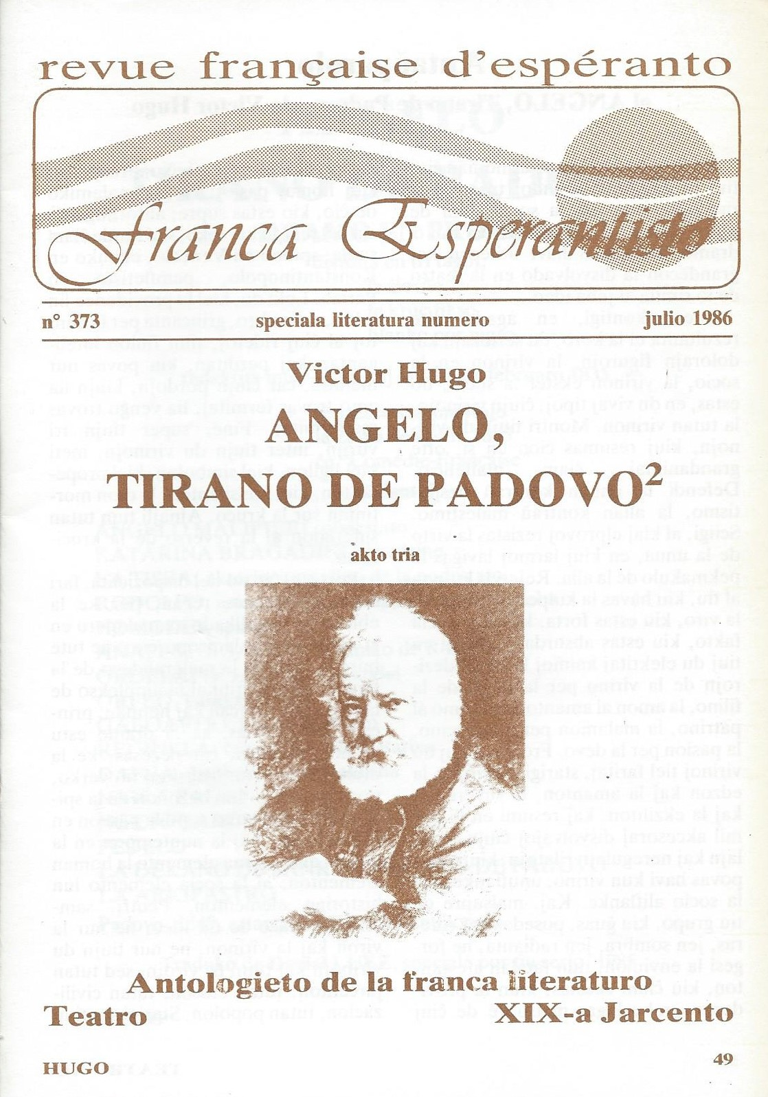 kovrilo de "Angelo, Tirano de Padovo", 1986